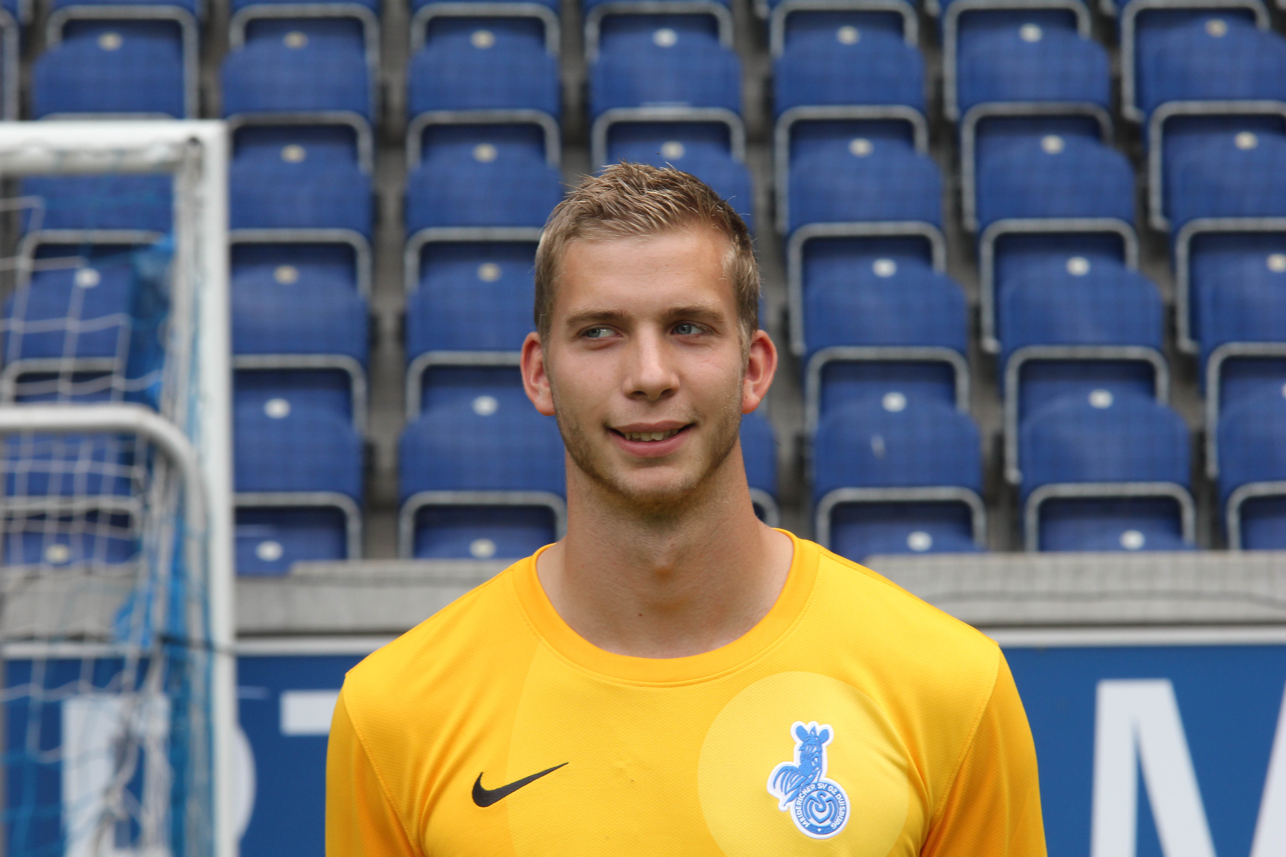 German football goalkeeper Felix Wiedwald, MSV Duisburg